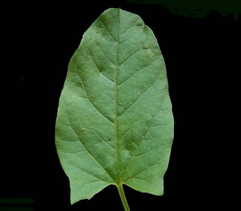 Convolvulus arvensis leaf